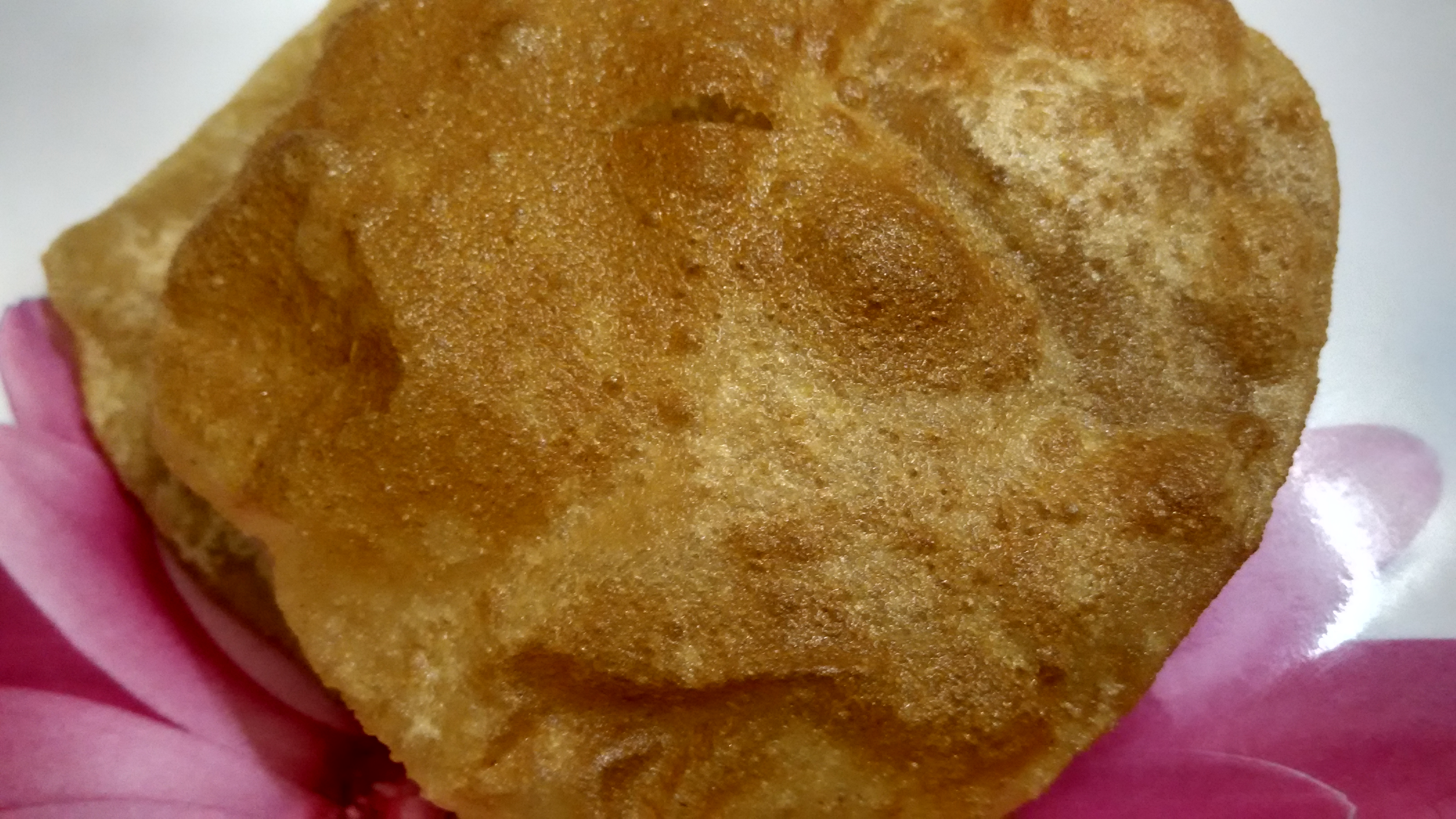 பூரி உணா.